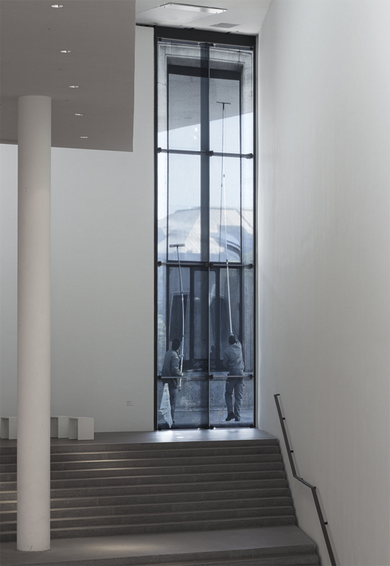 Veronika Kellndorfer French Window Foto:Ulrich Schwarz